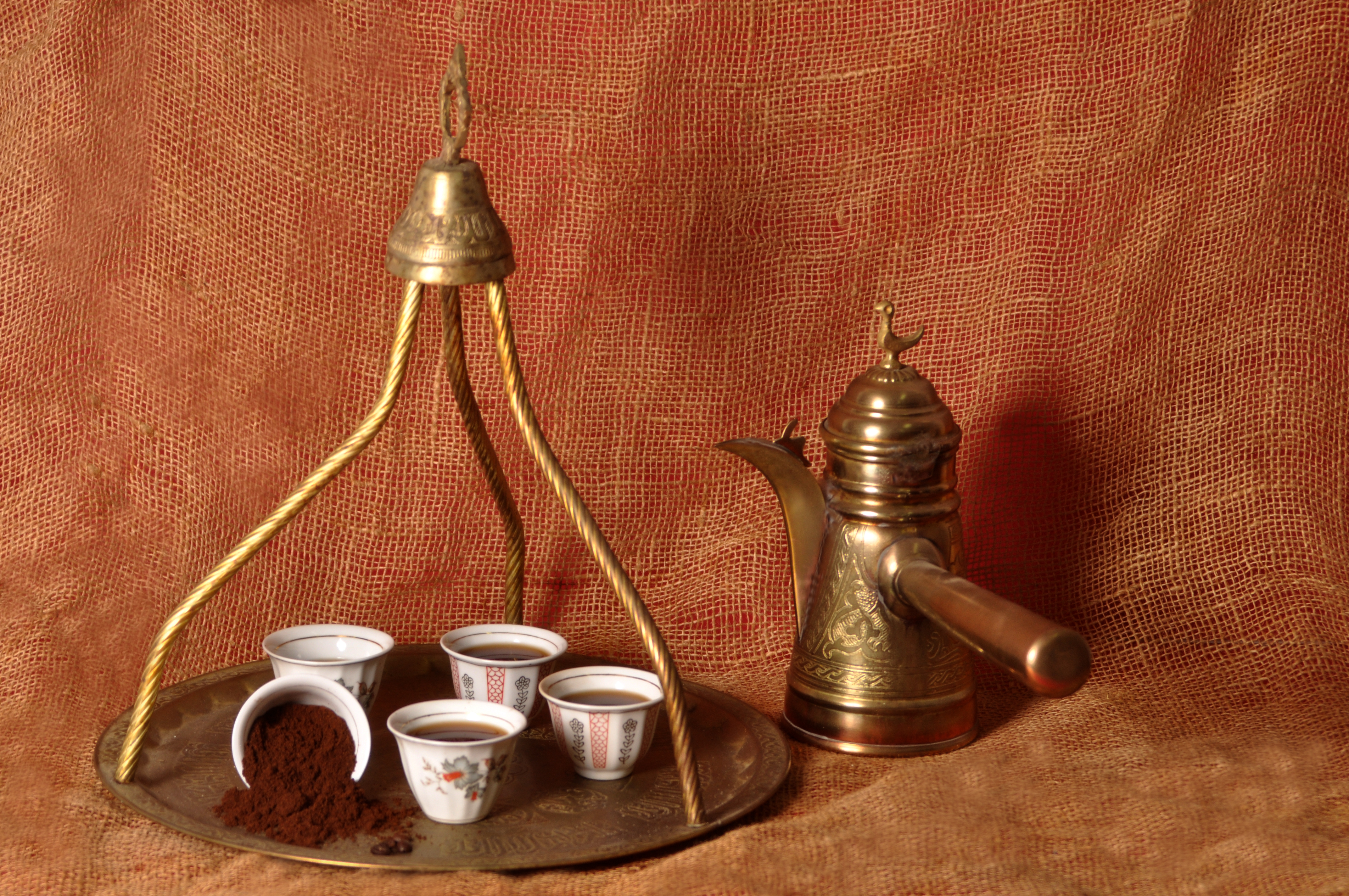 פינג'אן סטודיו תיכון רוטברג